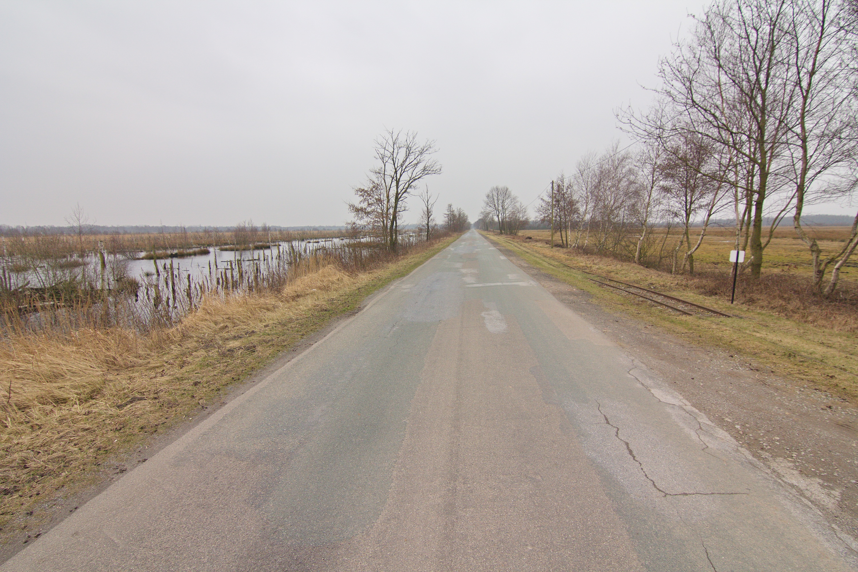 Moorgebiet Wietingsmoor, hier Naturschutzgebiet „Freistätter Moor“ in Freistatt (etwas südlich Deckertau, Blick nach Süden) im Landkreis Diepholz, Niedersachsen, Deutschland; rechts der Straße Gleis der Freistätter Feldbahn.